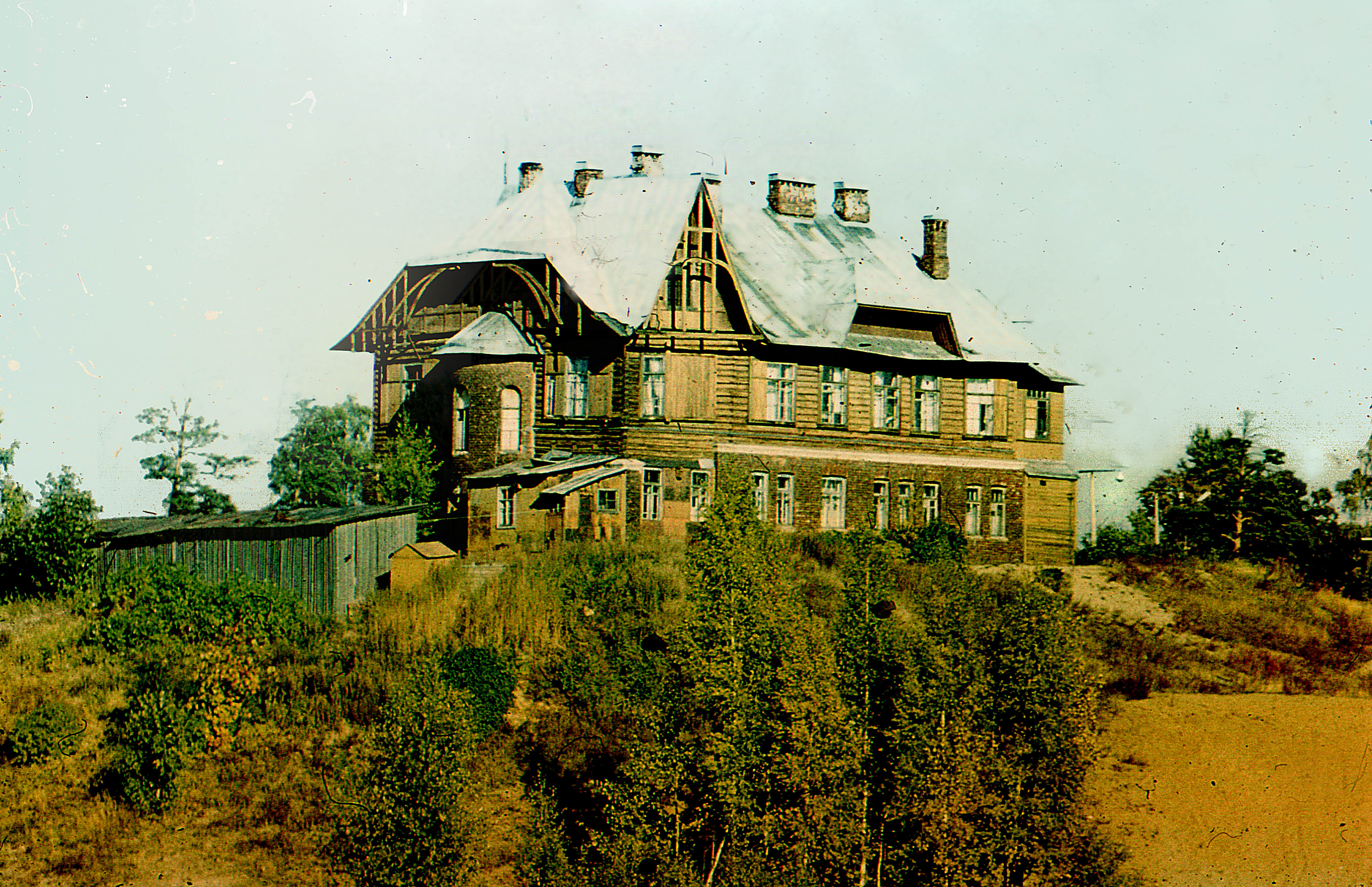 Петербург.Поклонная гора. Дом в стиле Арт-Нуво.Разобран.